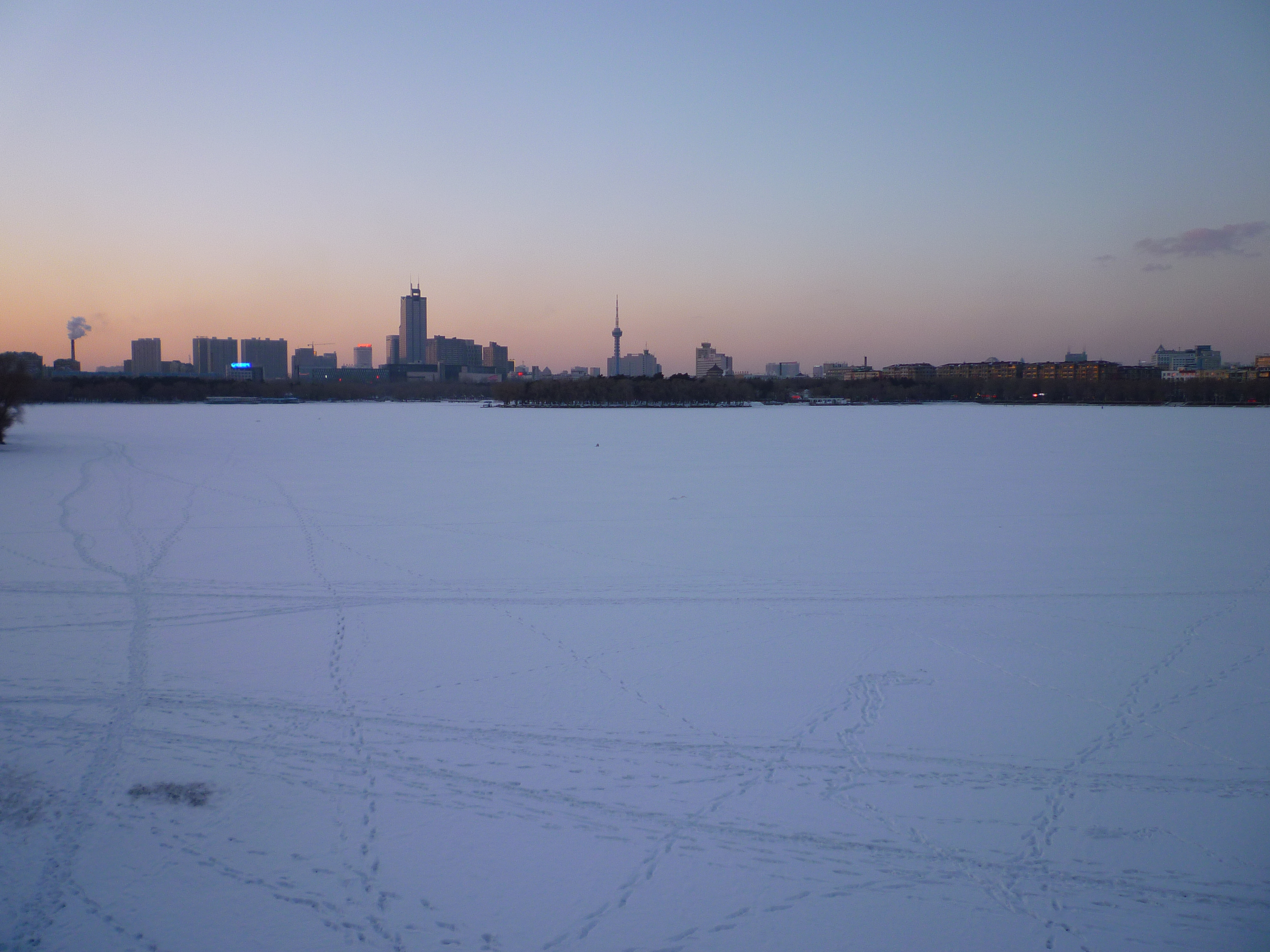 Nanhu-See im Nanhu-Park mit Skyline von Changchun